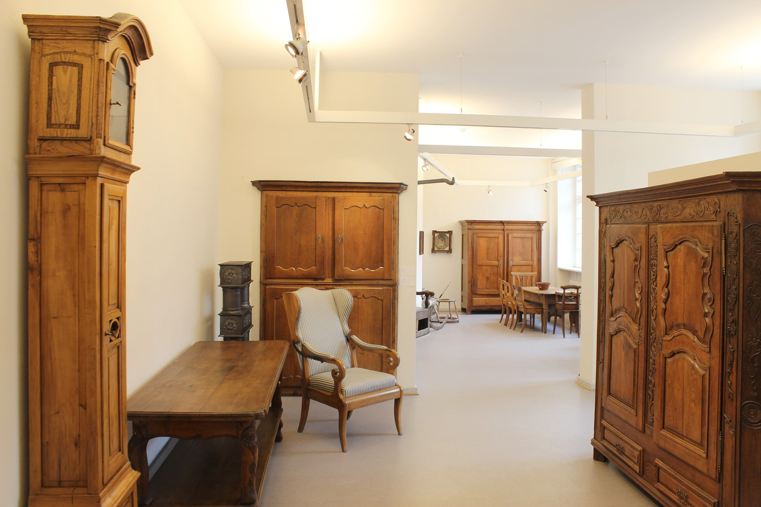 Der "Möbelraum" im Kreismuseum Bitburg-Prüm gibt einen Einblick in die ländliche Wohnkultur des 18. und 19. Jahrhunderts in der Südeifel.